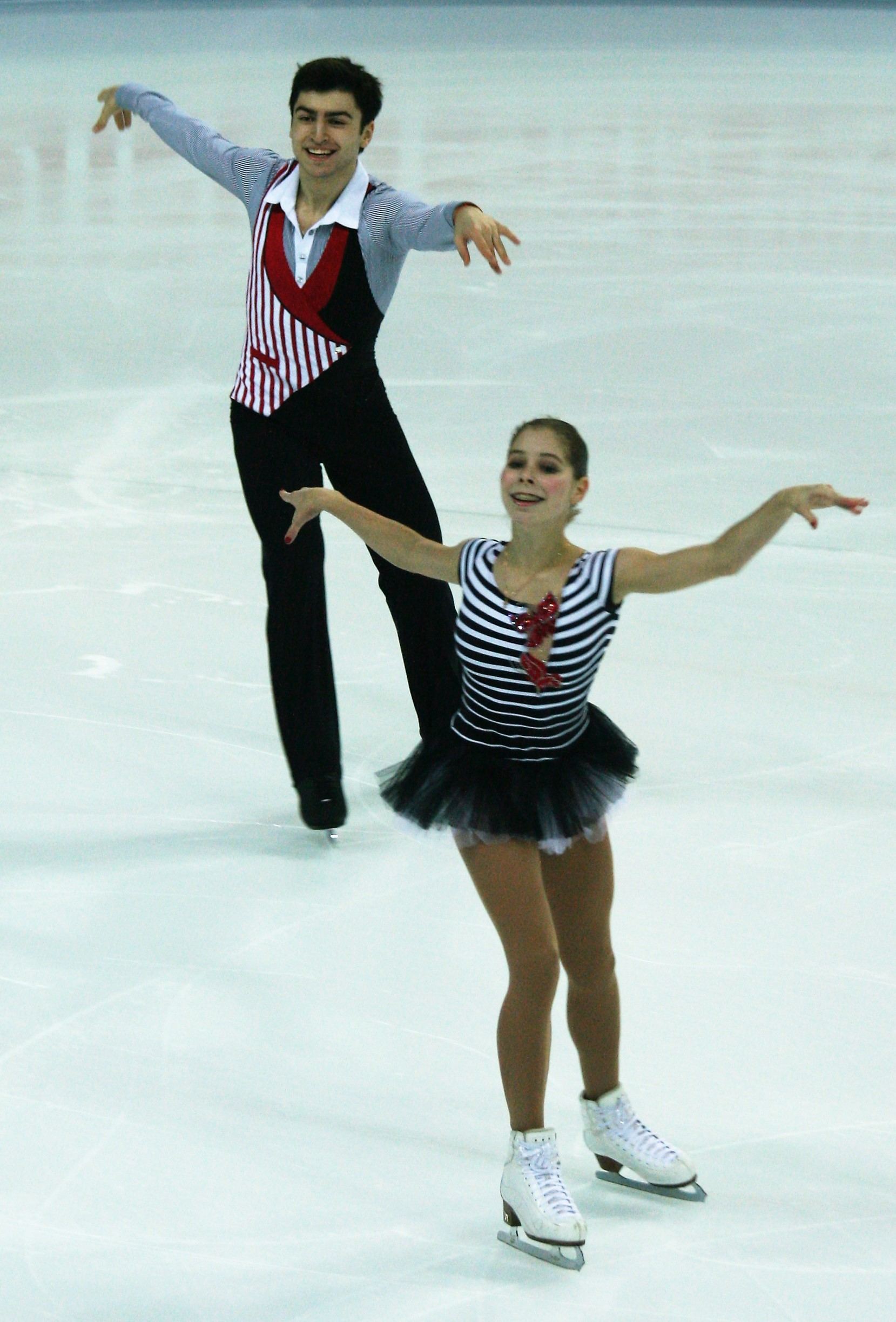 Анастасия Мишина / Владислав Мирзоев (Россия) на финале Гран-при по фигурному катанию среди юниоров 2016-2017